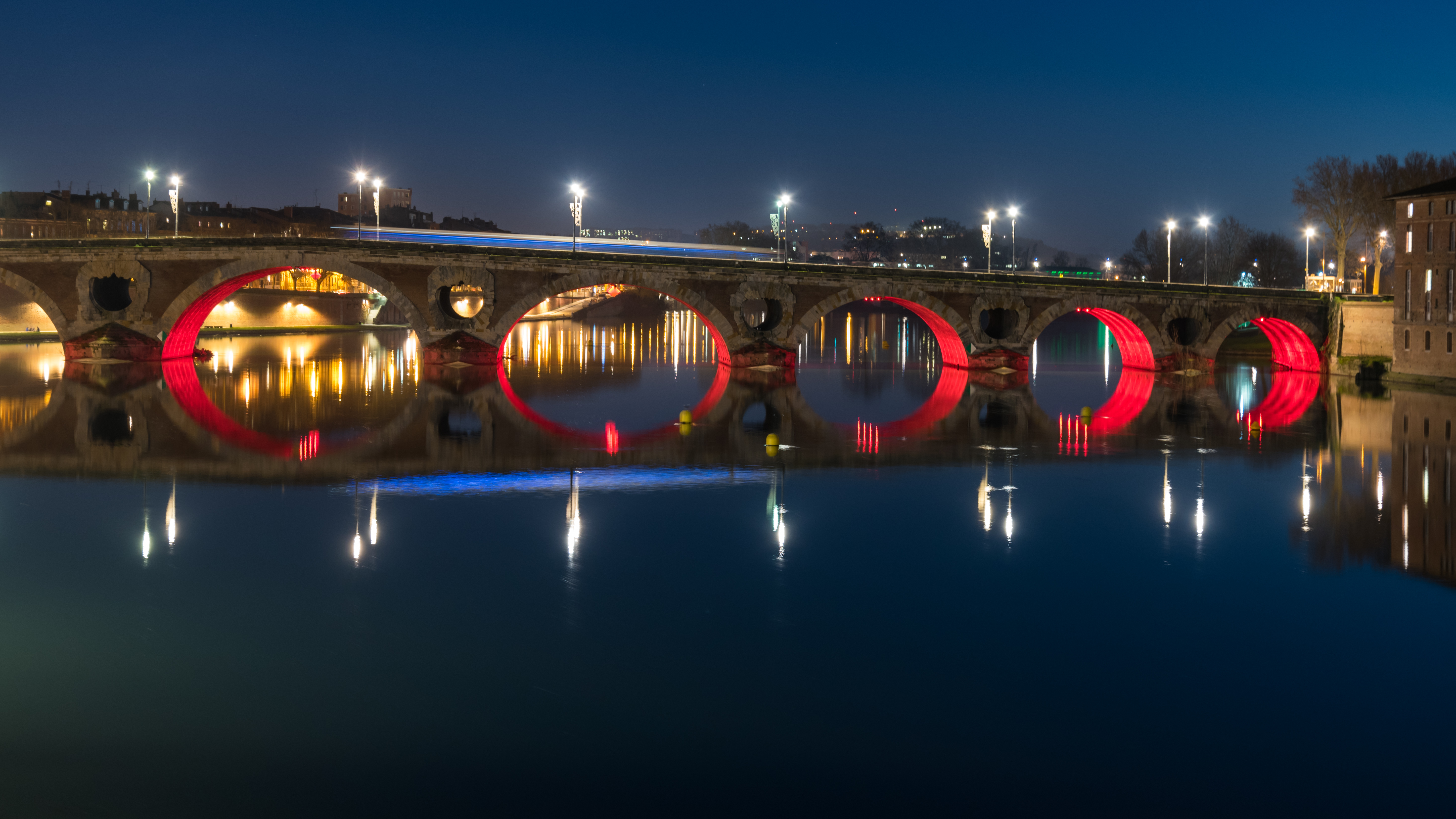 Le Pont-Neuf au dessus de la Garonne à Toulouse. Photographié l'hiver après le crépuscule, depuis le Quai Lucien Lombard